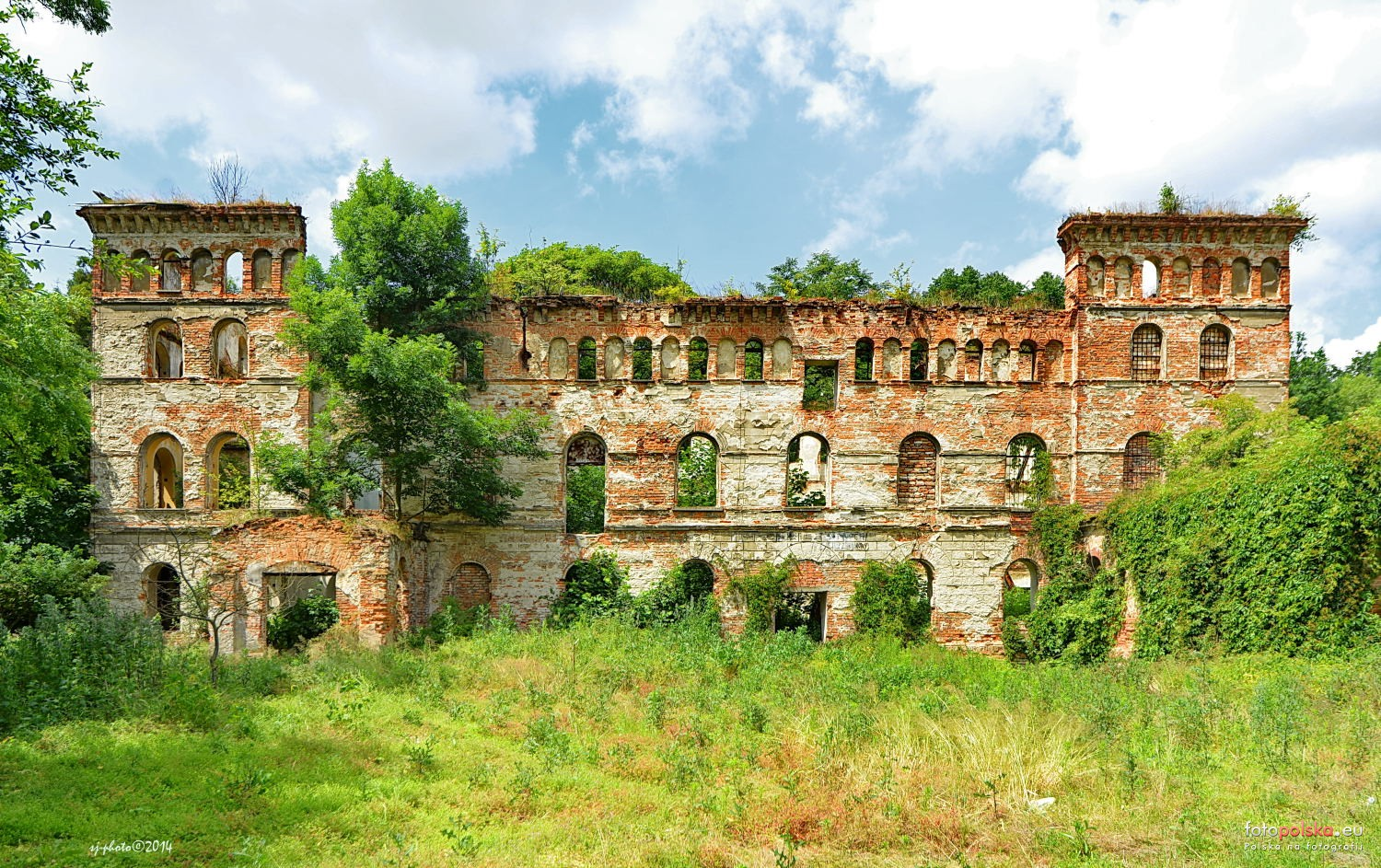 Młyn Amerykan